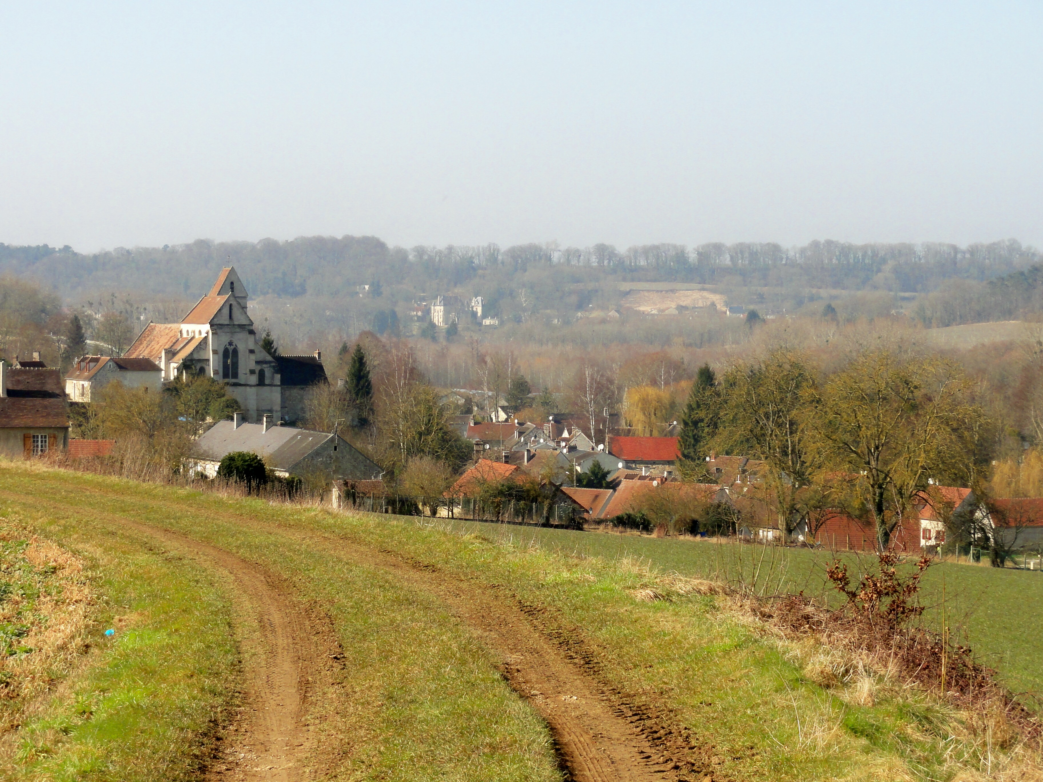 Vue sur le village depuis l'est - rue d'Hanicourt.